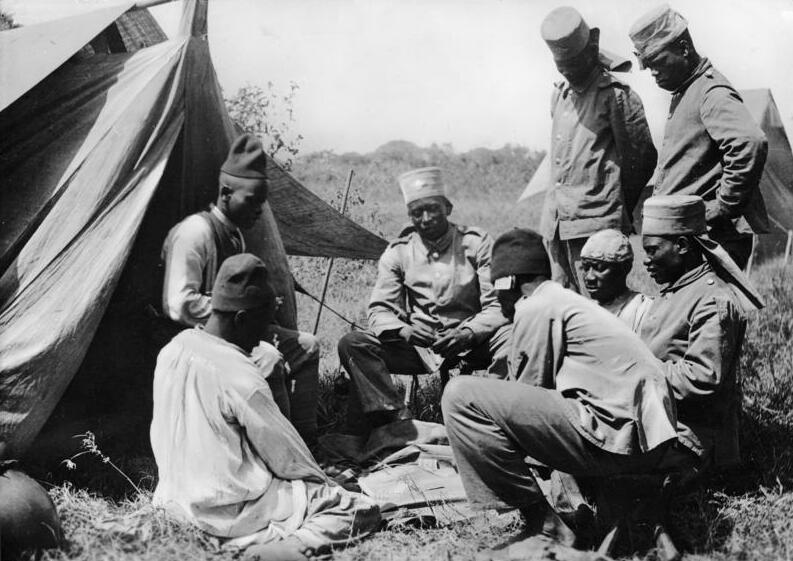 Askari beim Kartenspiel